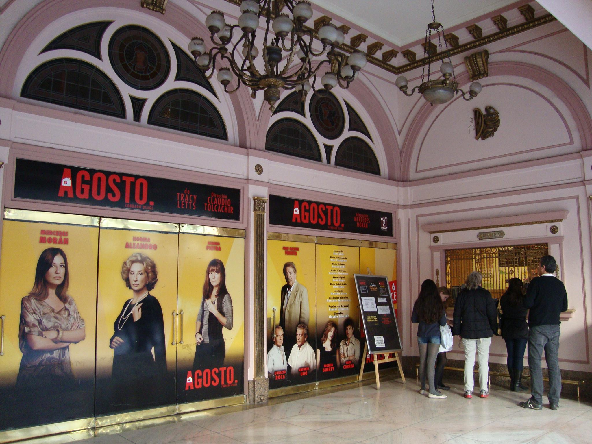 Vista parcial del porche y la boletería del Teatro Lola Membrives, en Avenida Corrientes 1280. Buenos Aires, Argentina.